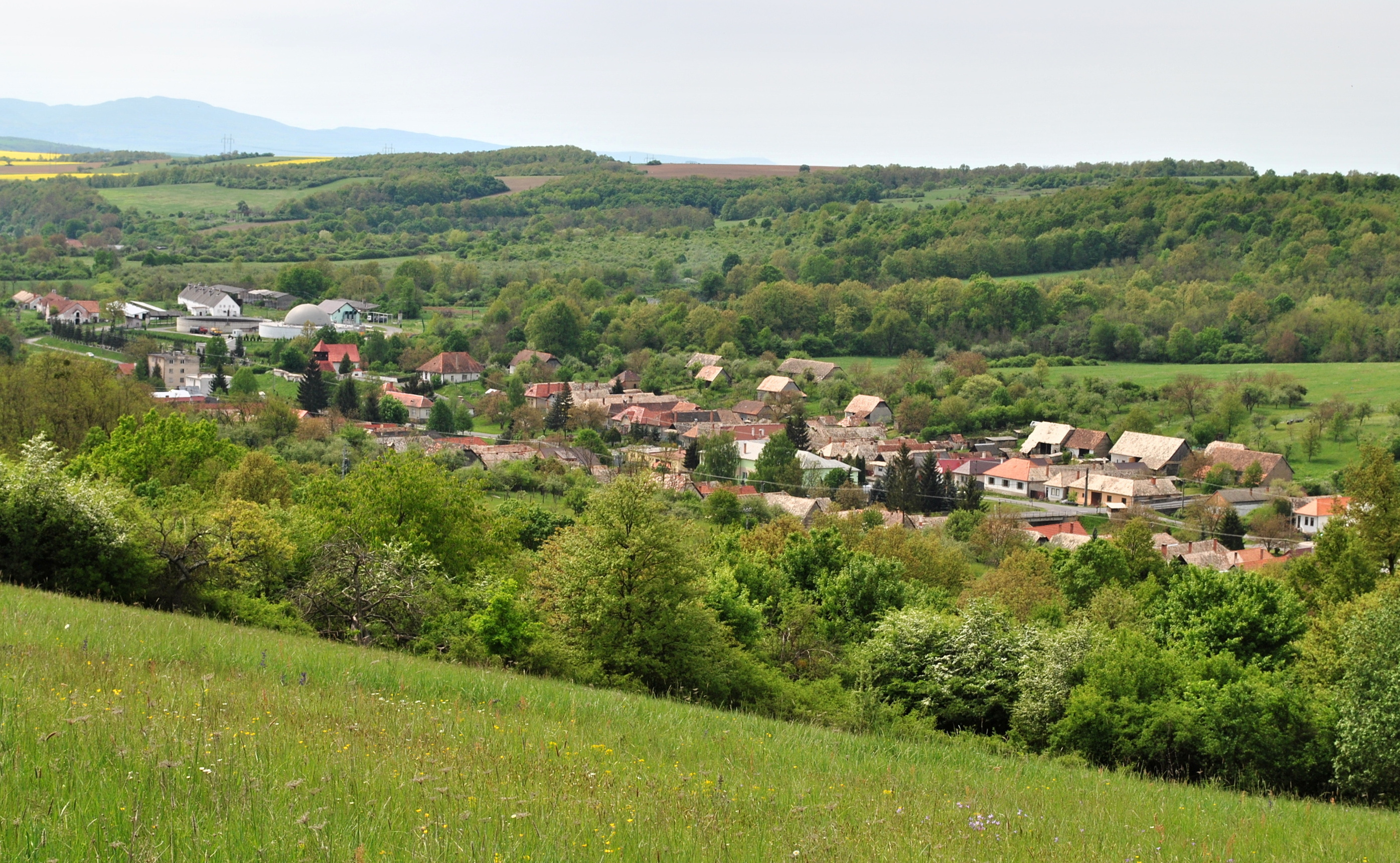 Ladzany, okr. Krupina - pohľad na obec